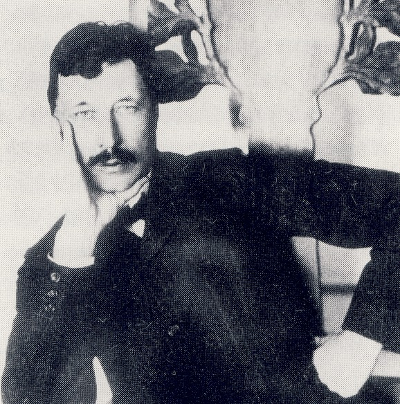 Arkitekt Ragnar Östberg omkring 1917